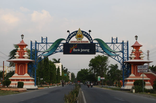 Tugu selamat datang kota purwodadi